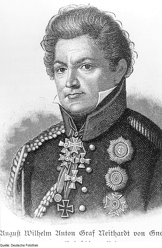 Original image description from the Deutsche Fotothek Reichenbach/O.L.-Mengelsdorf. August Wilhelm Anton Graf Neithardt von Gneisnau war 1813 auf der Windmühle